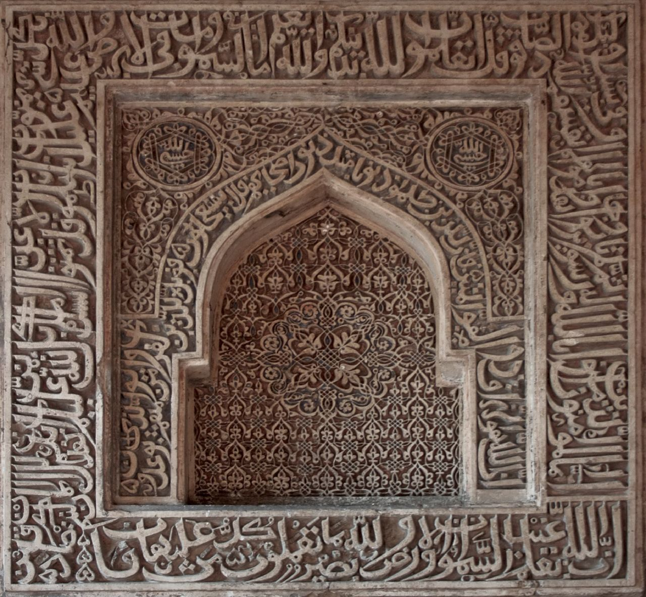 Quran inscriptions on Bara Gumbad mosque wall, Lodhi Gardens, Delhi.